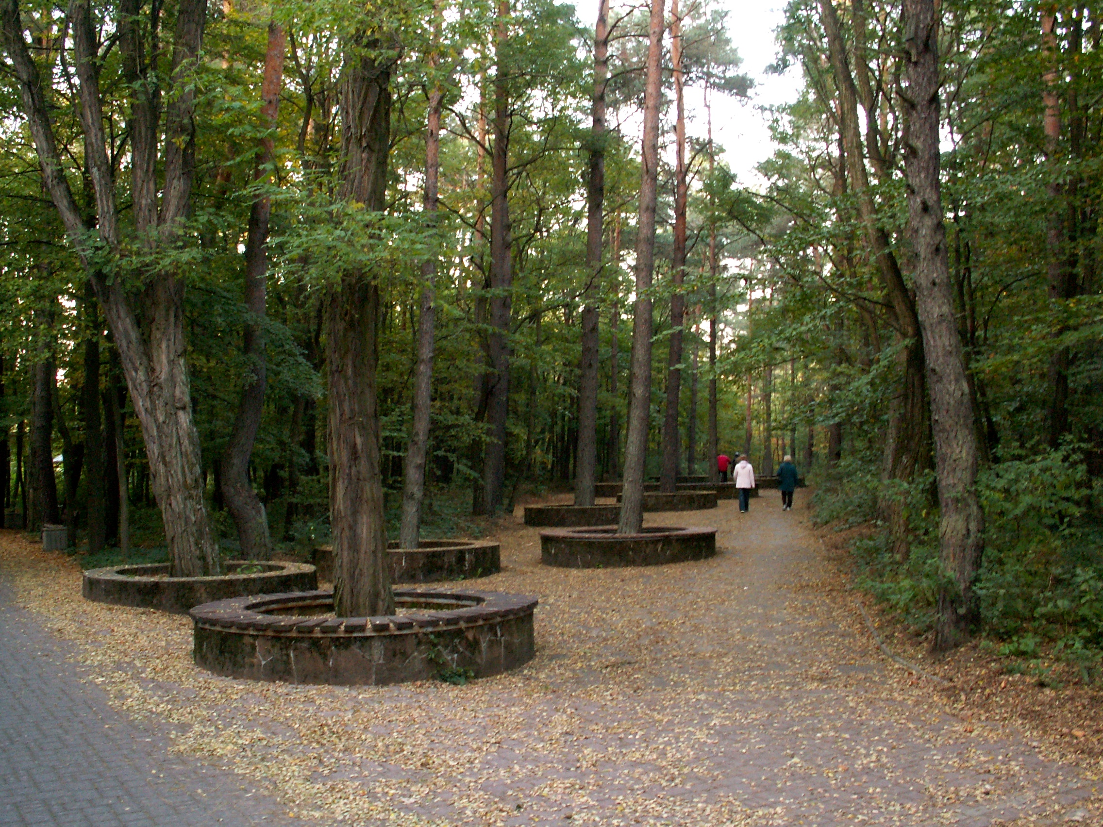 Stadion Leśny w Kielcach